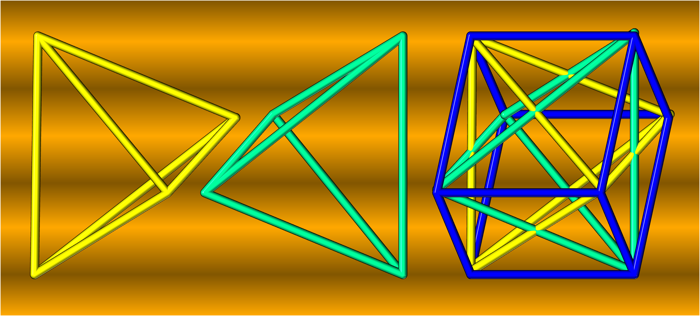 I vertici di due Tetraedri regolari di pari spigolo, disposti in modo che abbiano lo stesso centro e che i rispettivi spigoli si intersechino perpendicolarmente, individuano i vertici di un Cubo, in cui gli spigoli dei due tetraedri rappresentano le diagonali delle facce quadrate del Cubo.